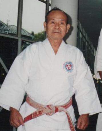 Imagen del maestro Yoshihide Shinzato, en ocasión de visitar la ciudad de Córdoba, en Argentina. Centro Cultural General Paz.